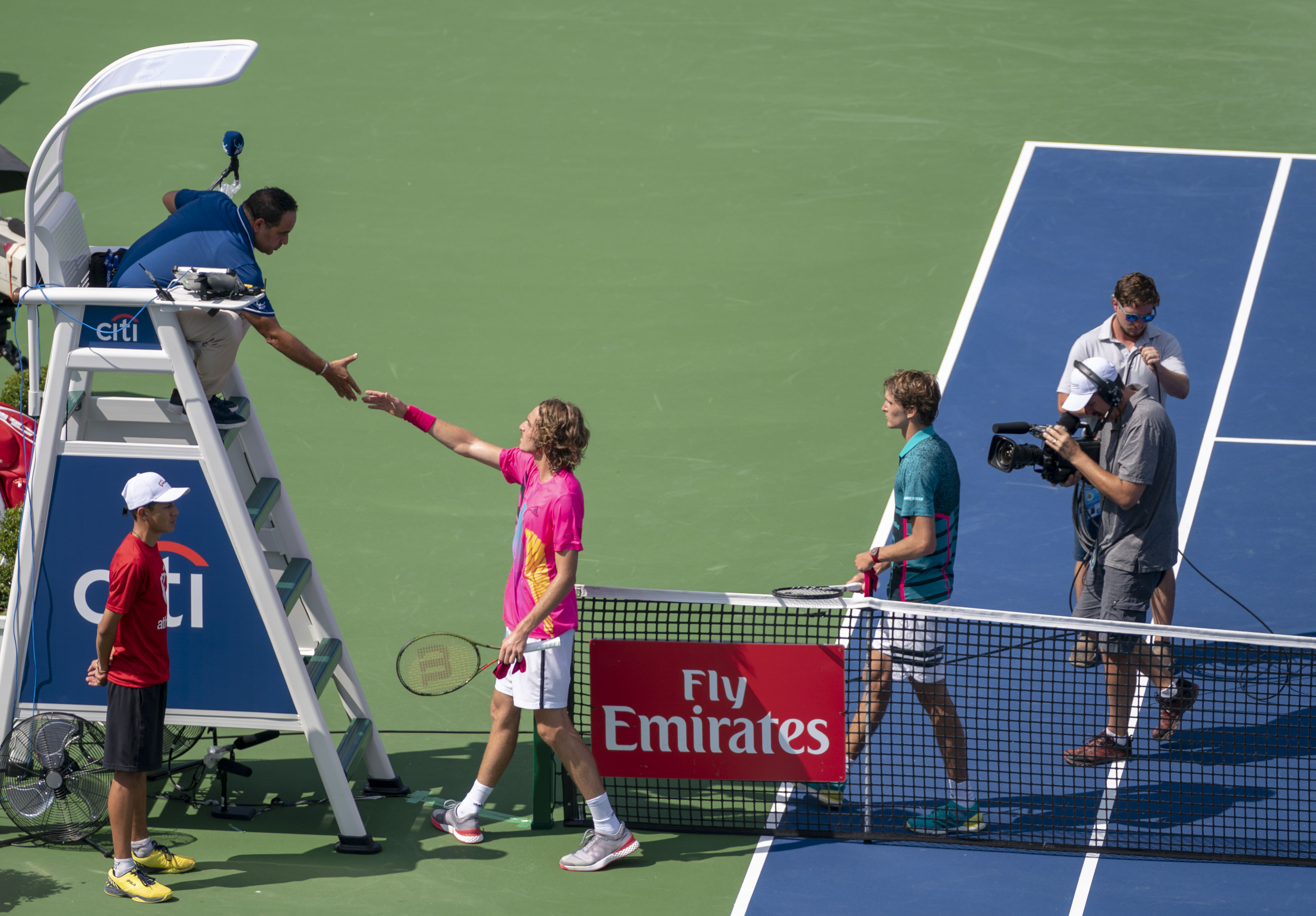 2018 Citi Open Tennis